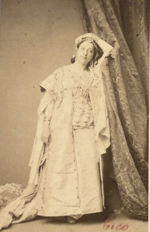 Portrait de Marie Cico, née Alexandrine-Louise-Hortense Trotté (1843-1875) cantatrice, par Numa Blanc & Cie, photographe